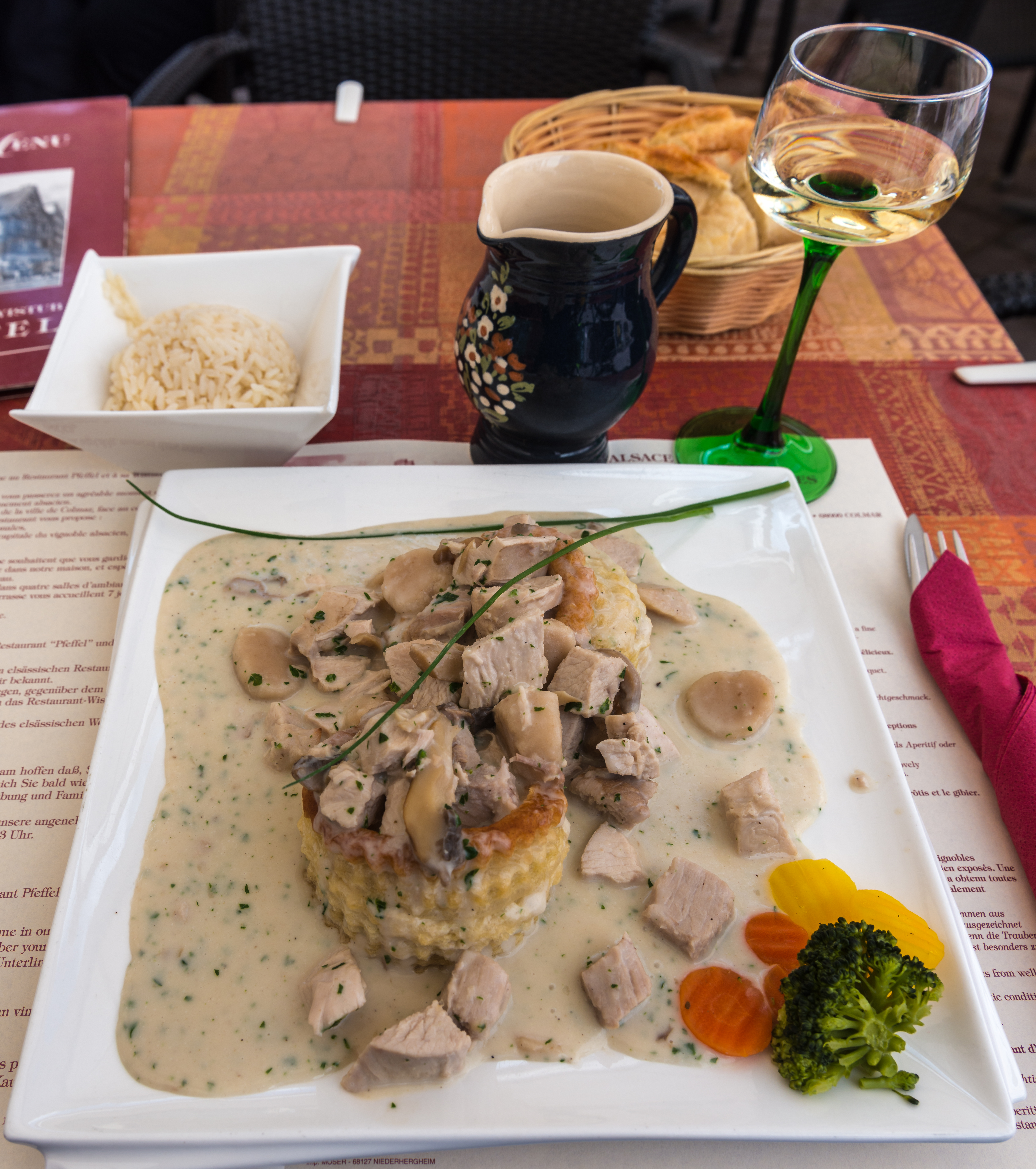 Colmar, Elsaß